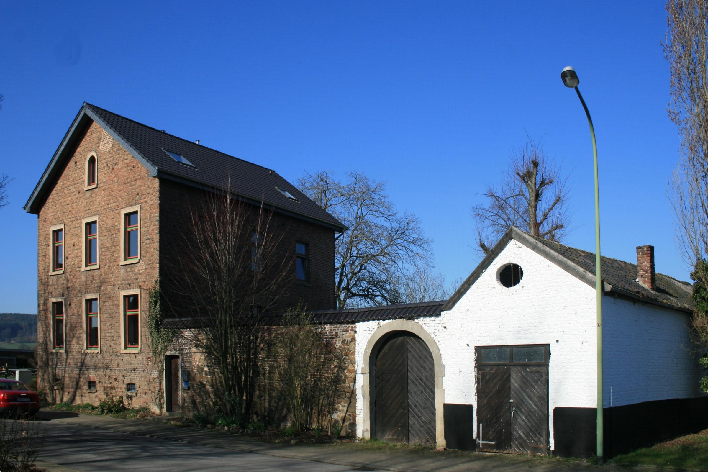 Denkmal Nr. 47 in Langerwehe-D´Horn